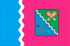 Прапор Чорнобаївського району